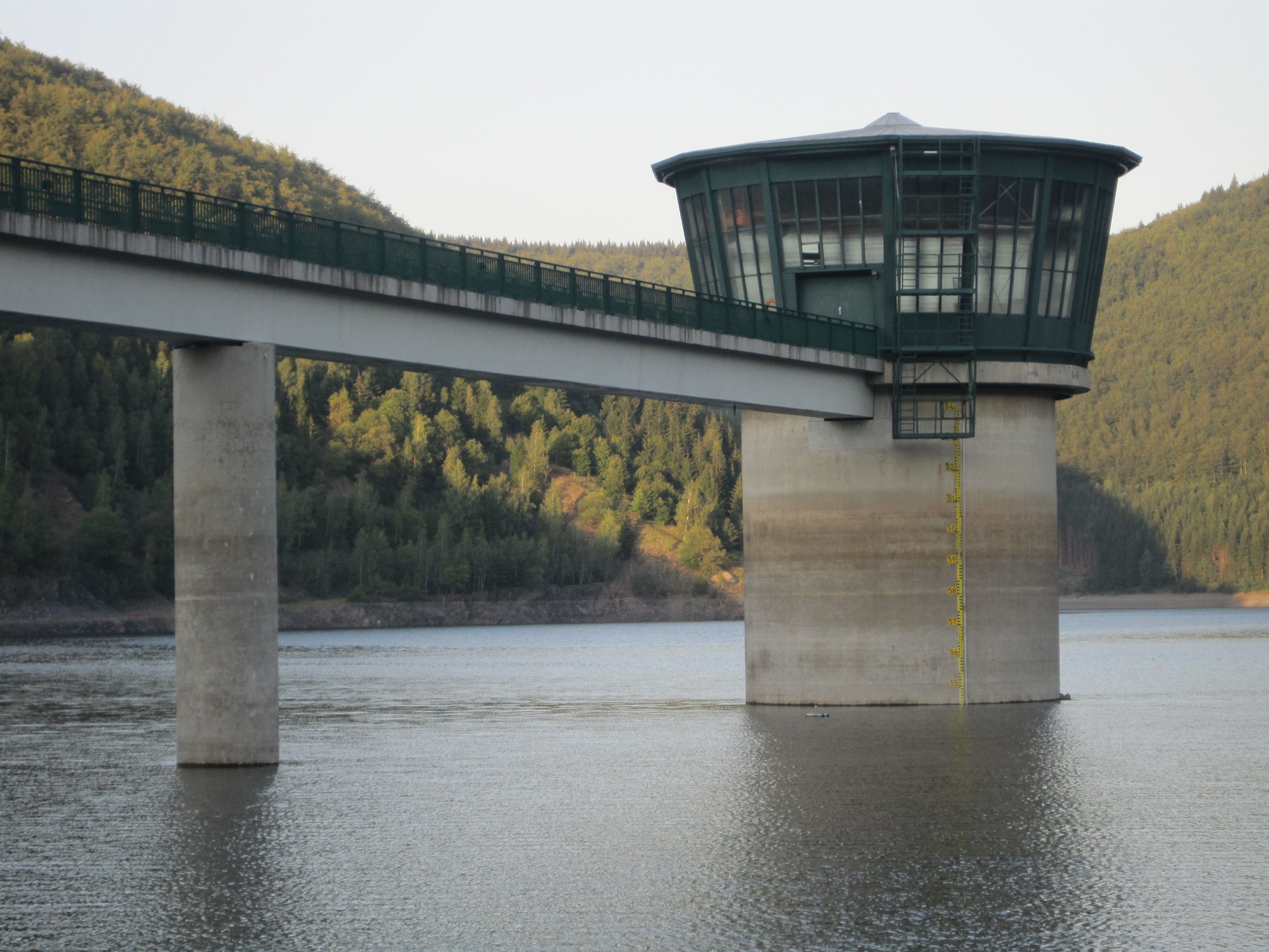 Rohwasserentnahmeturm mit Zugangsbrücke